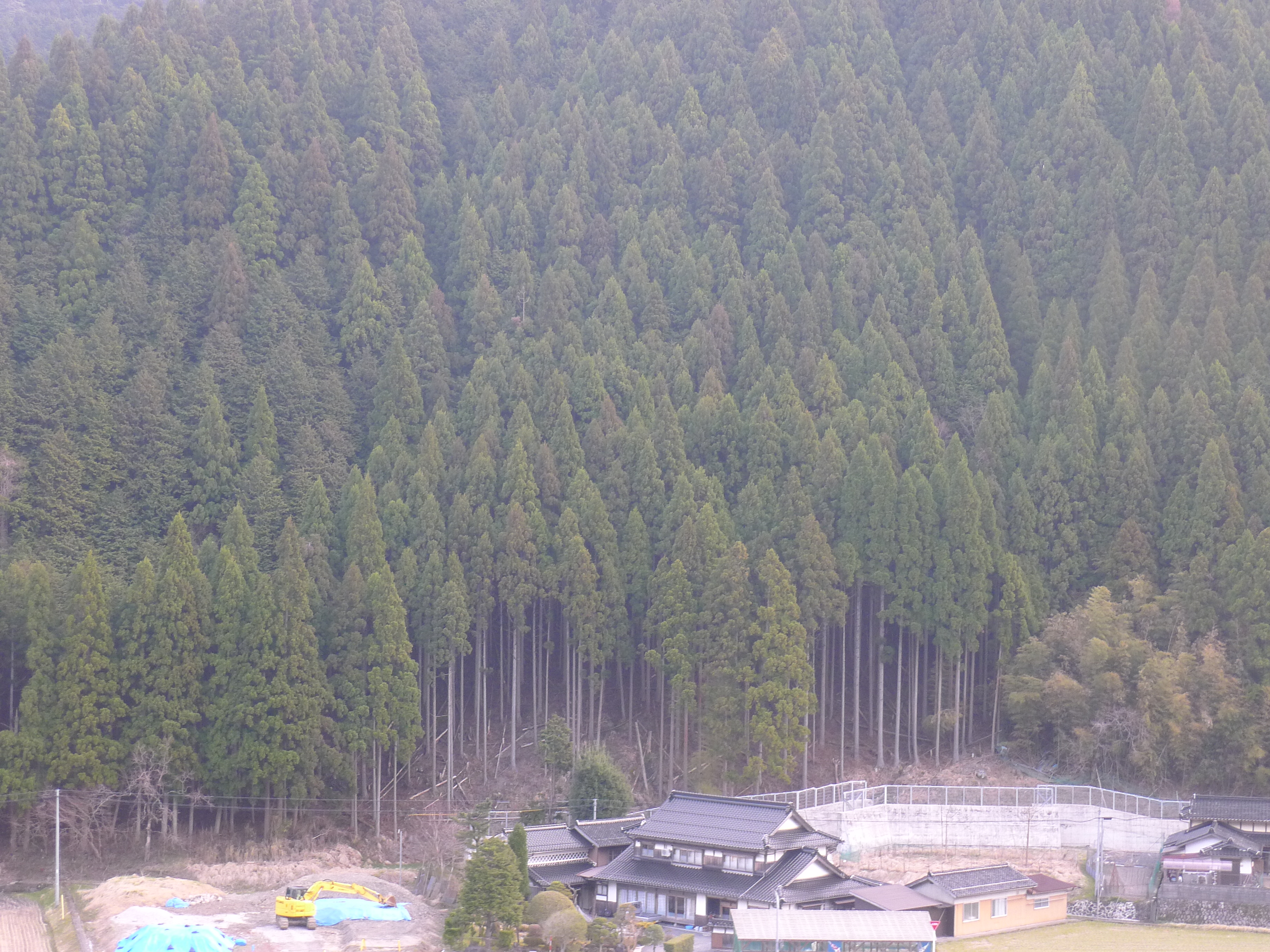 文化財保護法・重要文化的景観選定「智頭の林業景観」（鳥取県智頭町） 智頭杉の営林風景